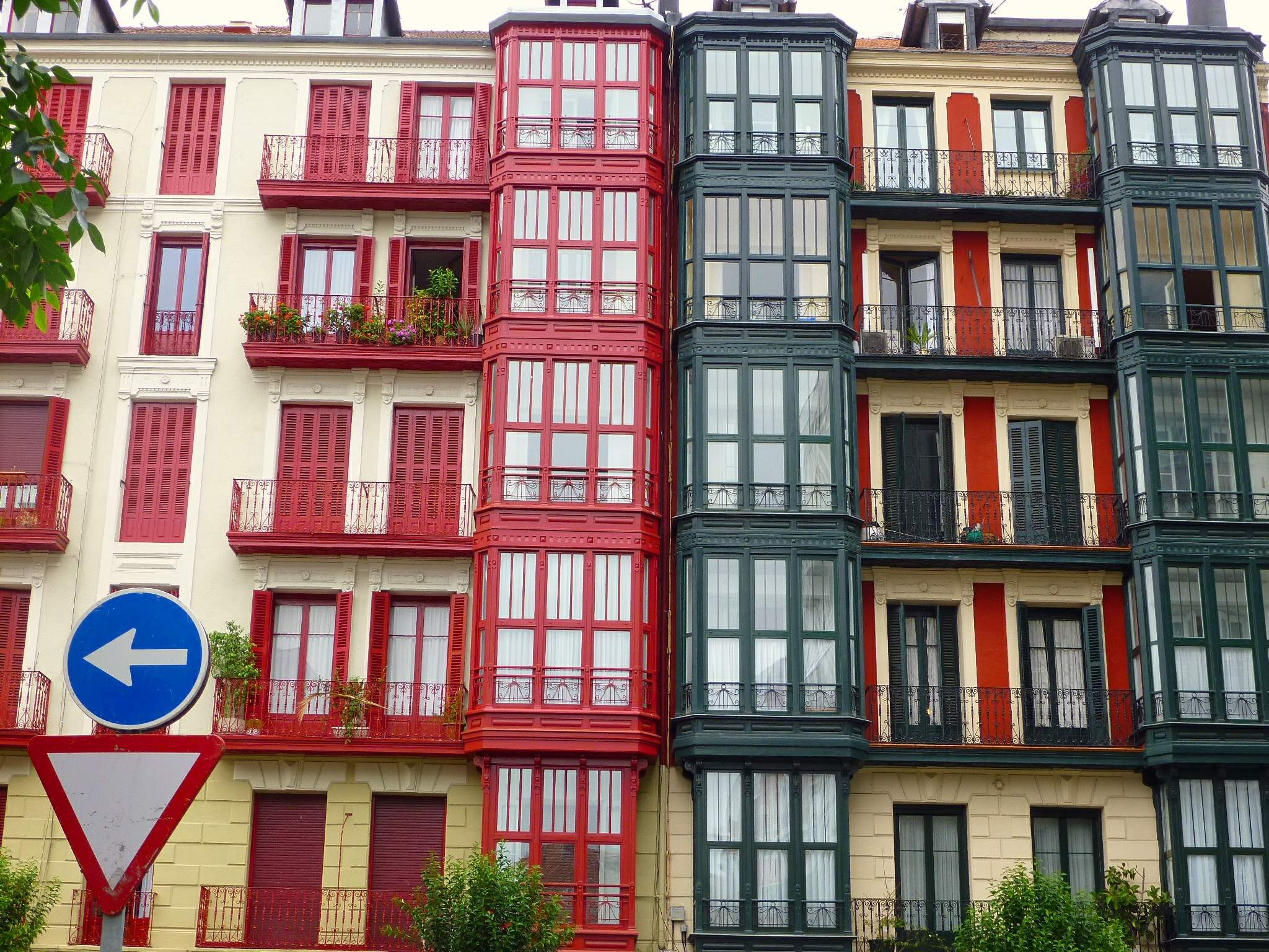 Calle Henao (Bilbao)